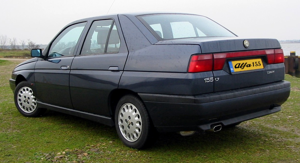 Alfa Romeo 155 Widebody